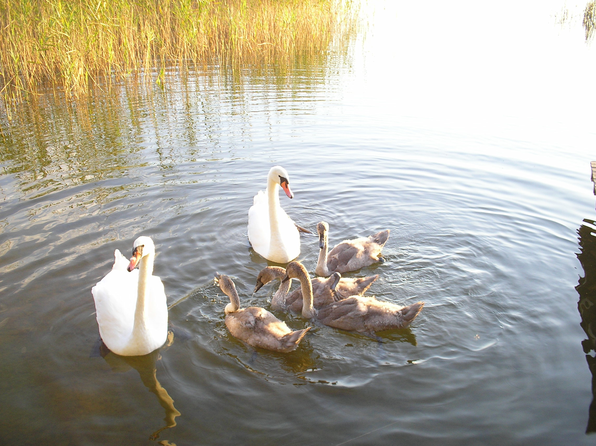 łabędzie na j.dybowskim